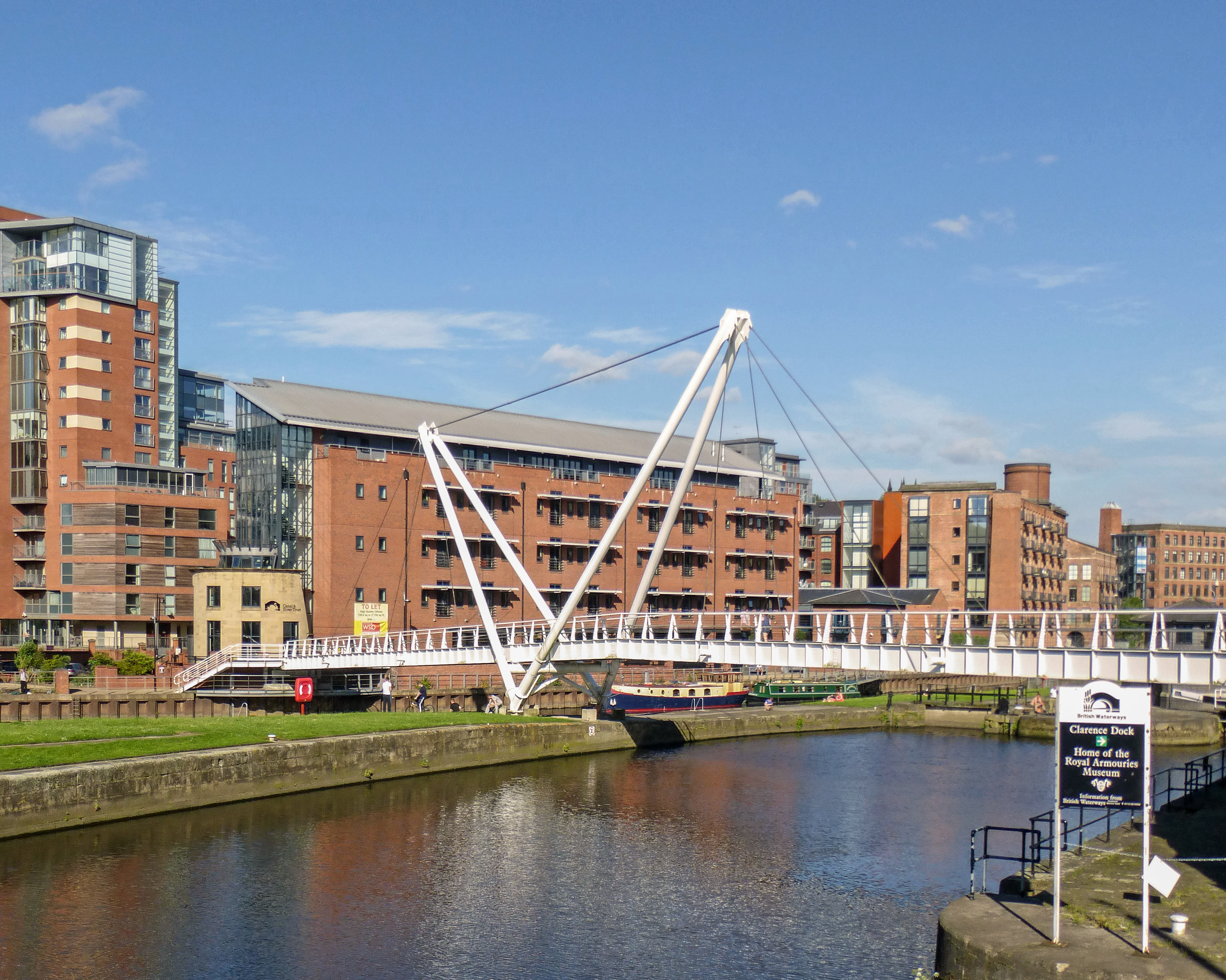 Leeds